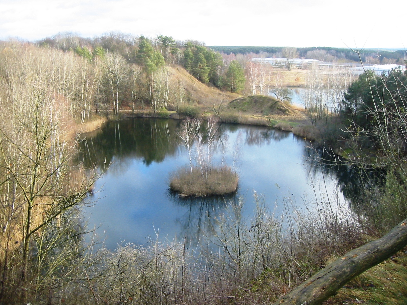 Blick vom Panoramaweg in das Restloch 1 des Naturschutzgebietes „Sperenberger Gipsbrüche“ in Sperenberg, ein Ortsteil der Gemeinde Am Mellensee, Teltow-Fläming, Brandenburg